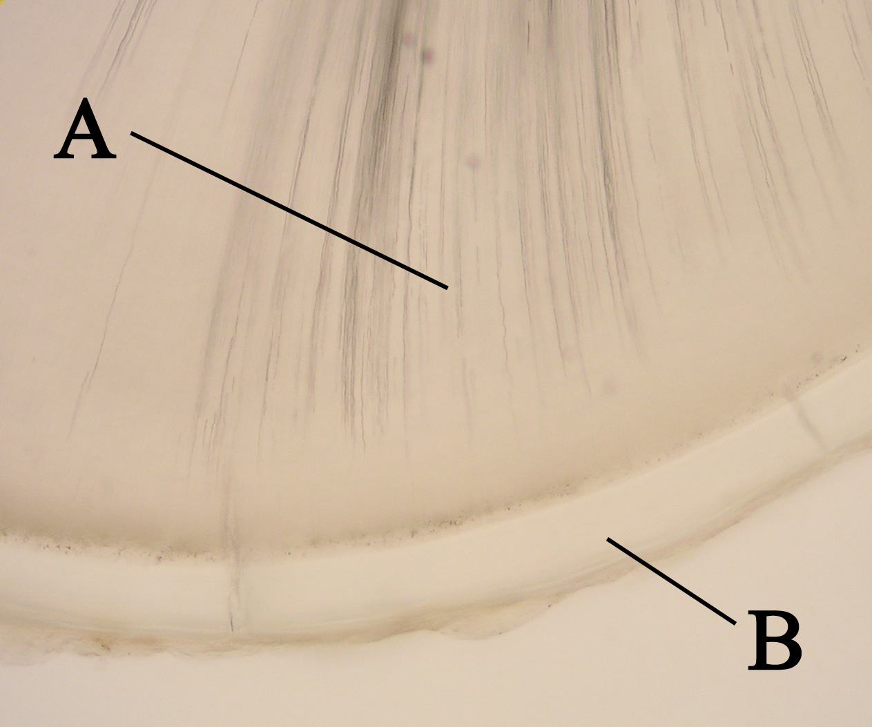 Sección coronal de una raíz. Nótese la apariencia clara y acelular del cemento.A: dentinaB: cemento. Histologic slide of cross-section of tooth at root with dentin labeled A and cementum labeled B. Source: Photo taken by user:dozenist.